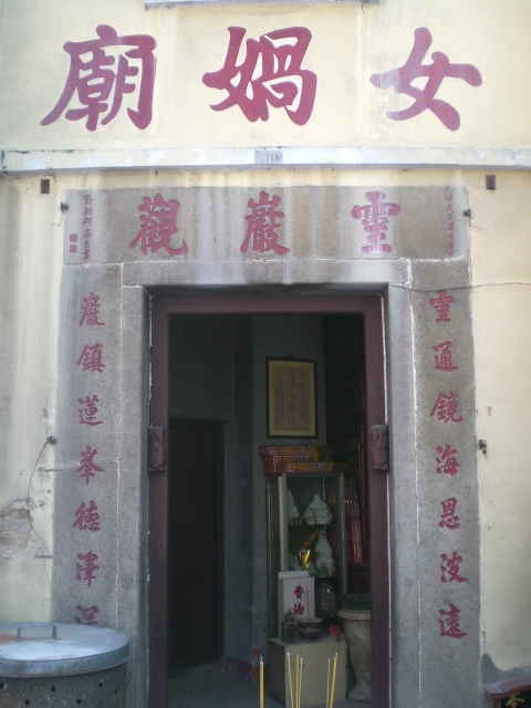 女媧廟位於澳門草堆街與大三巴街交界，近大三巴牌坊。 Photo author= Mo707